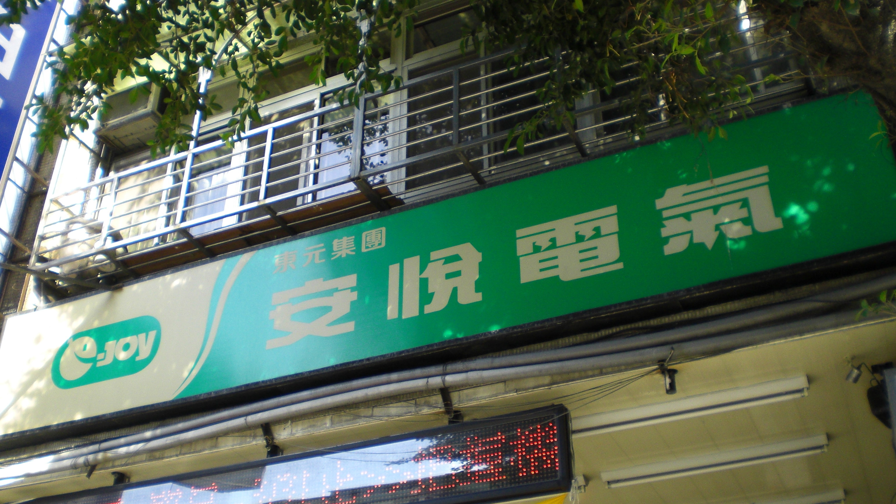 東元集團安悅電氣加盟店招牌